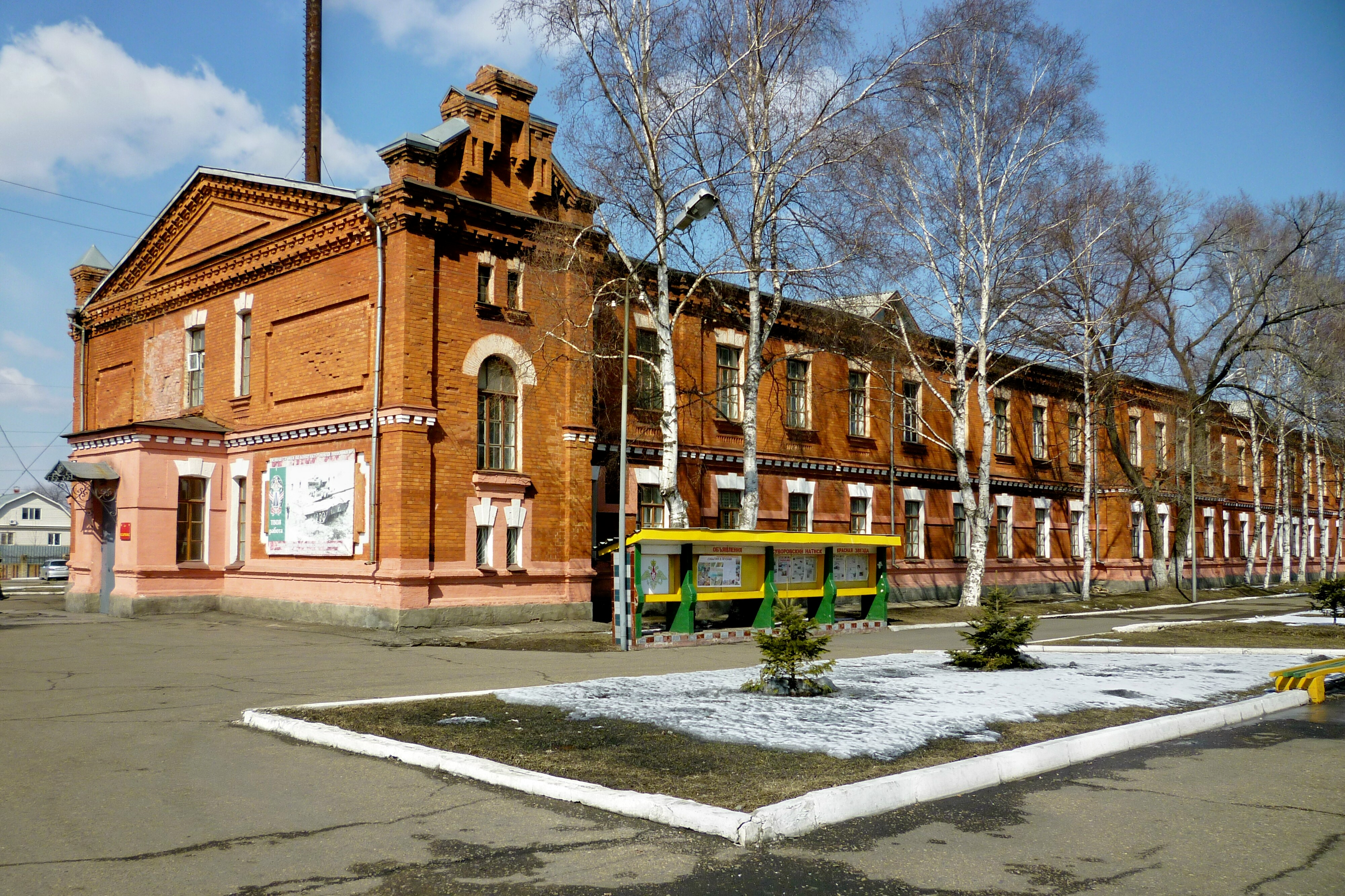 Здание казармы, где был сформирован первый батальон приморской красной армии: улица Афанасьева, 8, Уссурийск, Приморский край